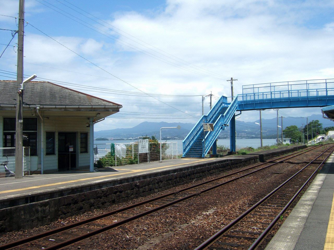 JR九州長崎本線大草駅構内